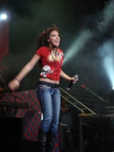 Belinda en el Auditorio Coca Cola en Monterrey Nuevo León, durante su gira Utopía